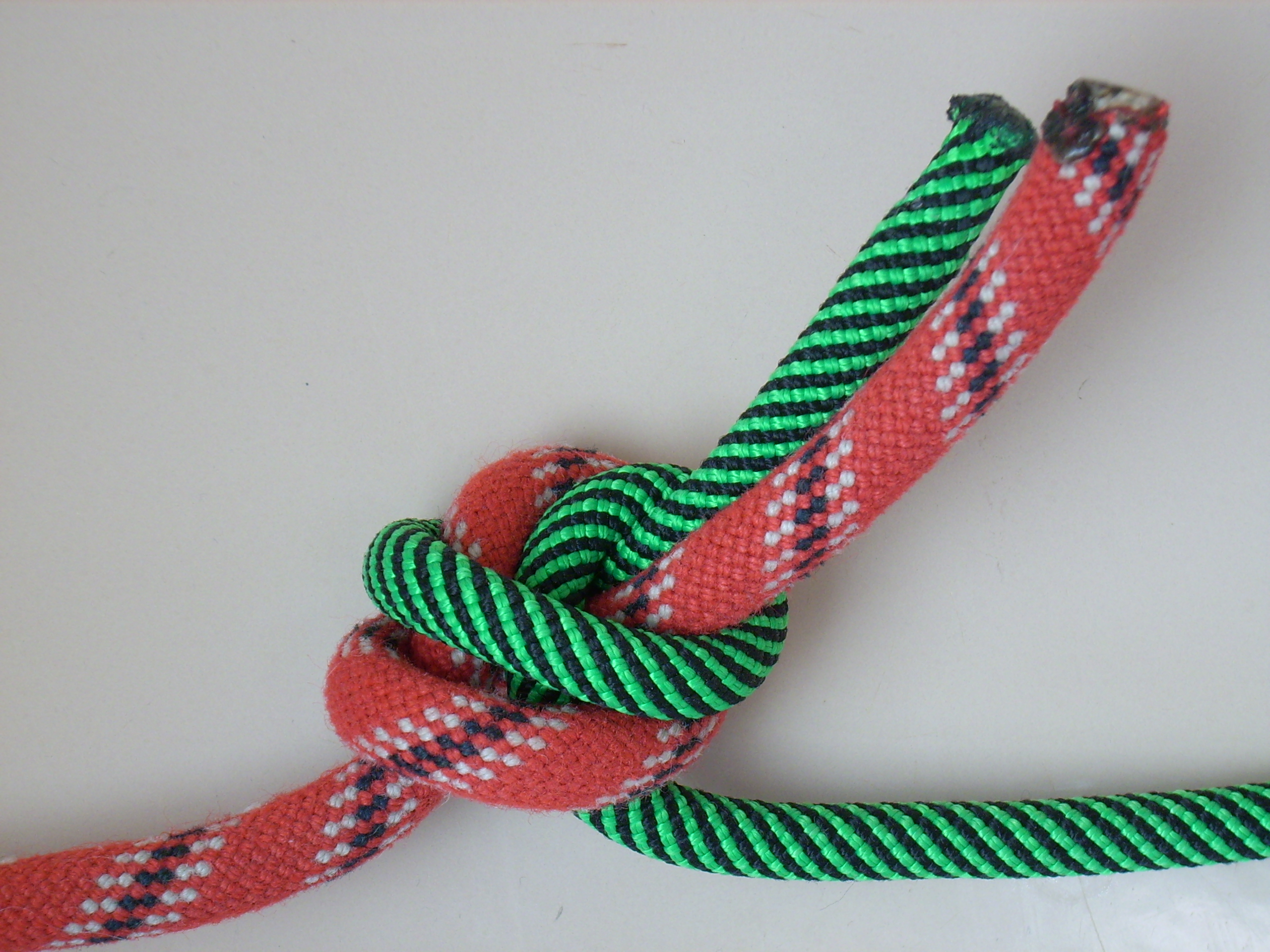 Sackstich in Tropfenform, zur Verbindung von zwei Seilen